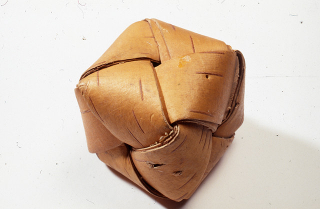 Tuohipallo eli rapapalli eli meätshä. Sisällä kiviä. Valmistanut 12.10.1941 Maija Karhunen.